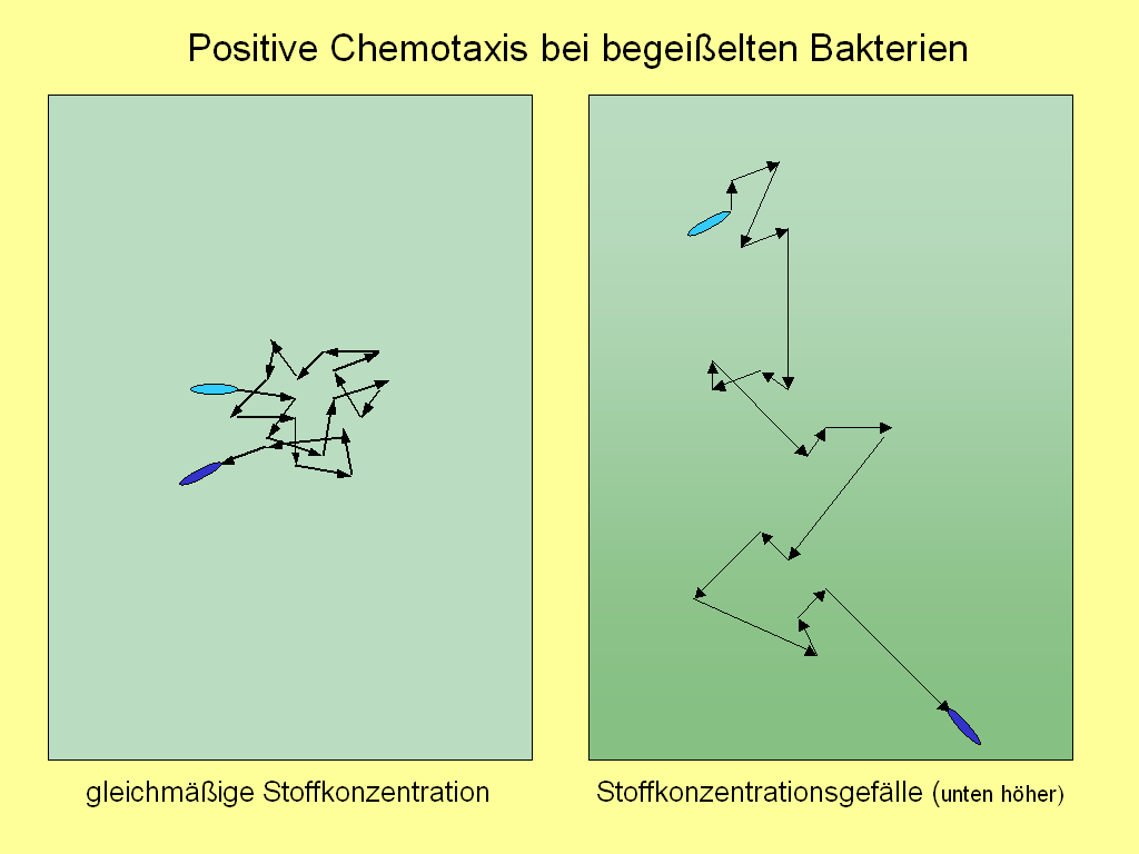 Schema des Bewegungsverhaltens peritrich begeißelter Bakteien bei positiver Chemotaxis bei gleichmäßiger Stoffkonzentration und im Konzentrationsgradient